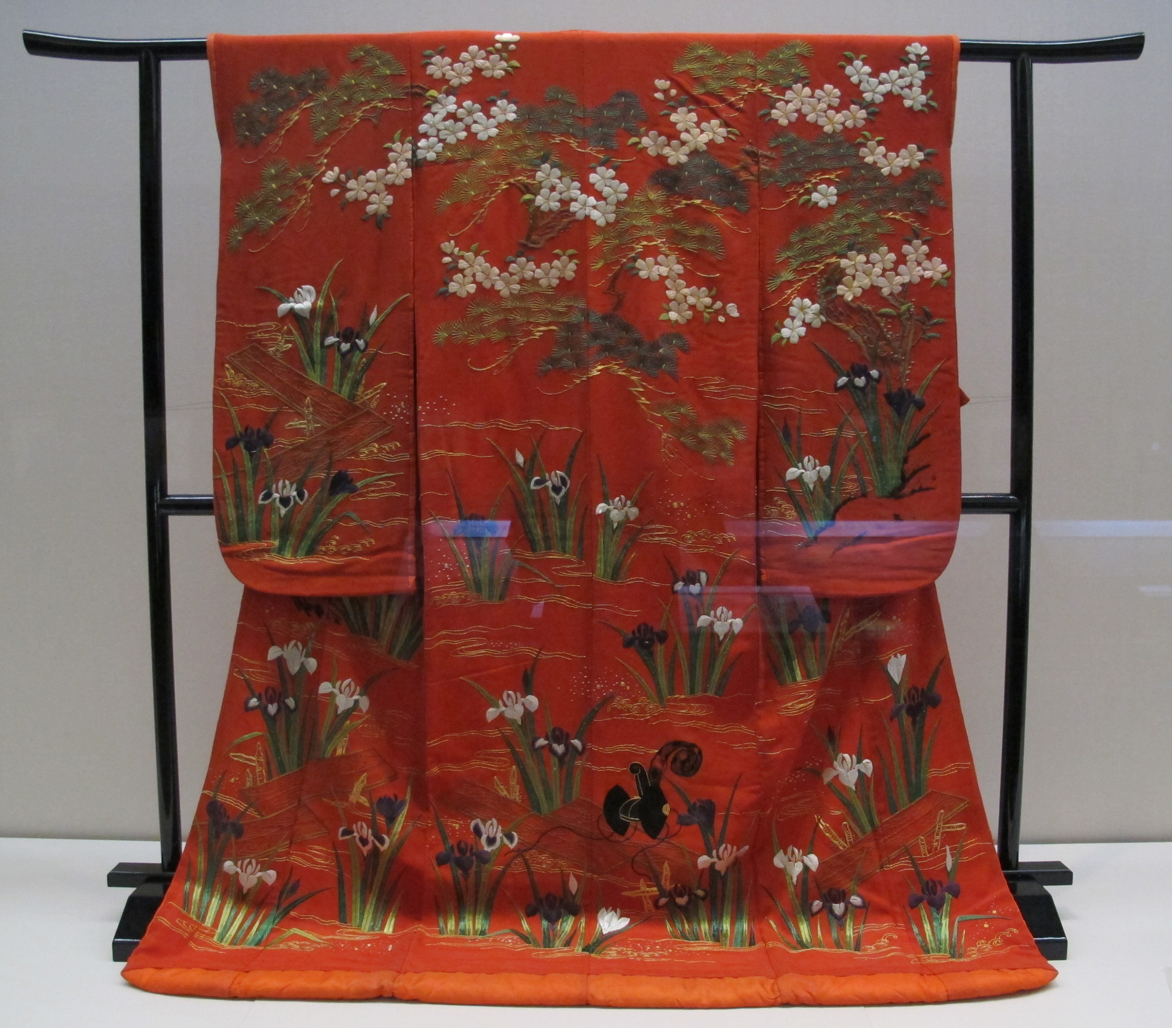 Periodo edo, uchikake, XIX sec.